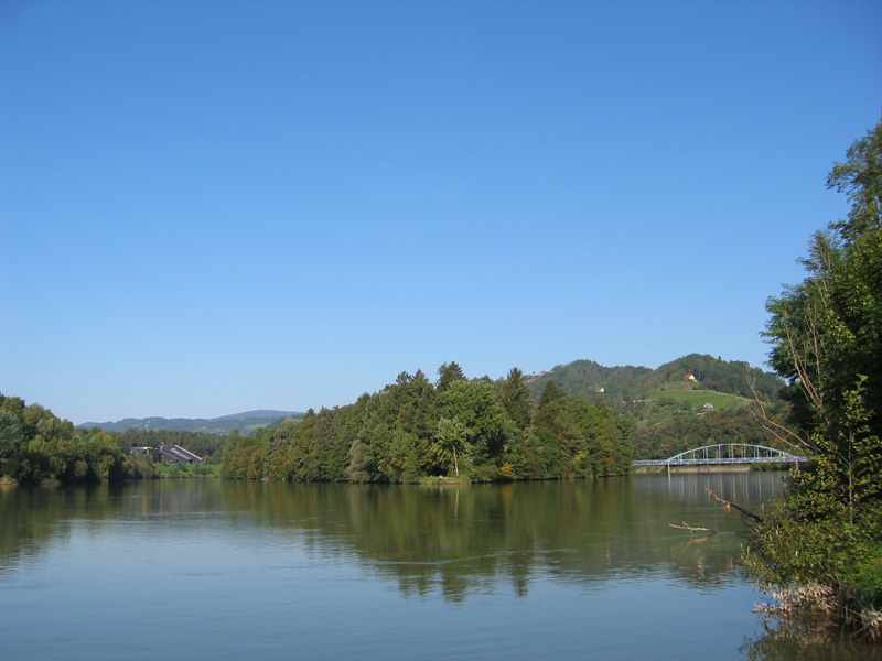 Mariborski otok